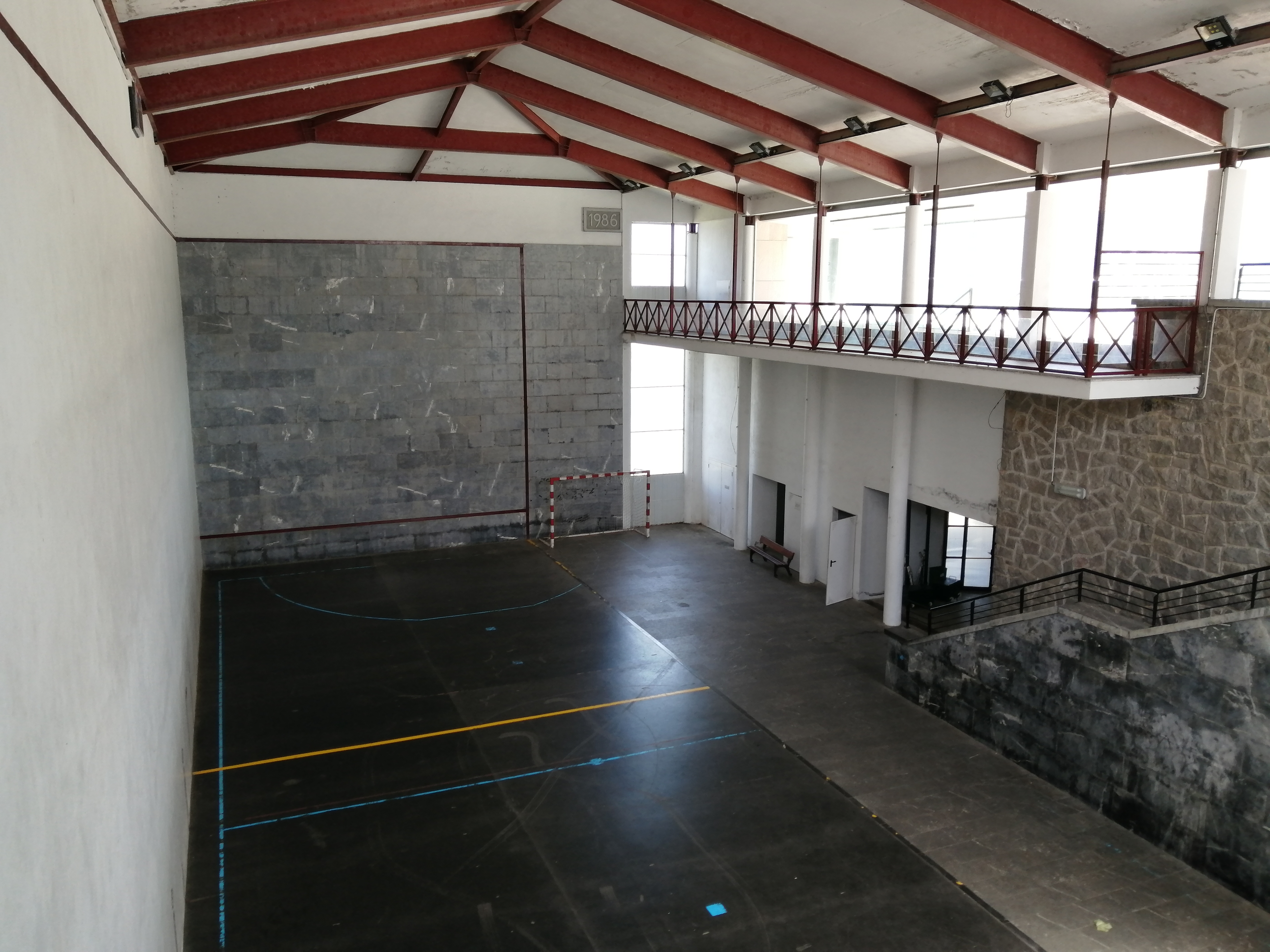 Abaltzisketako frontoia